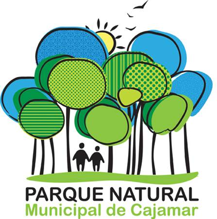 Português do Brasil: Logo Municipal Natural Park Cajamar